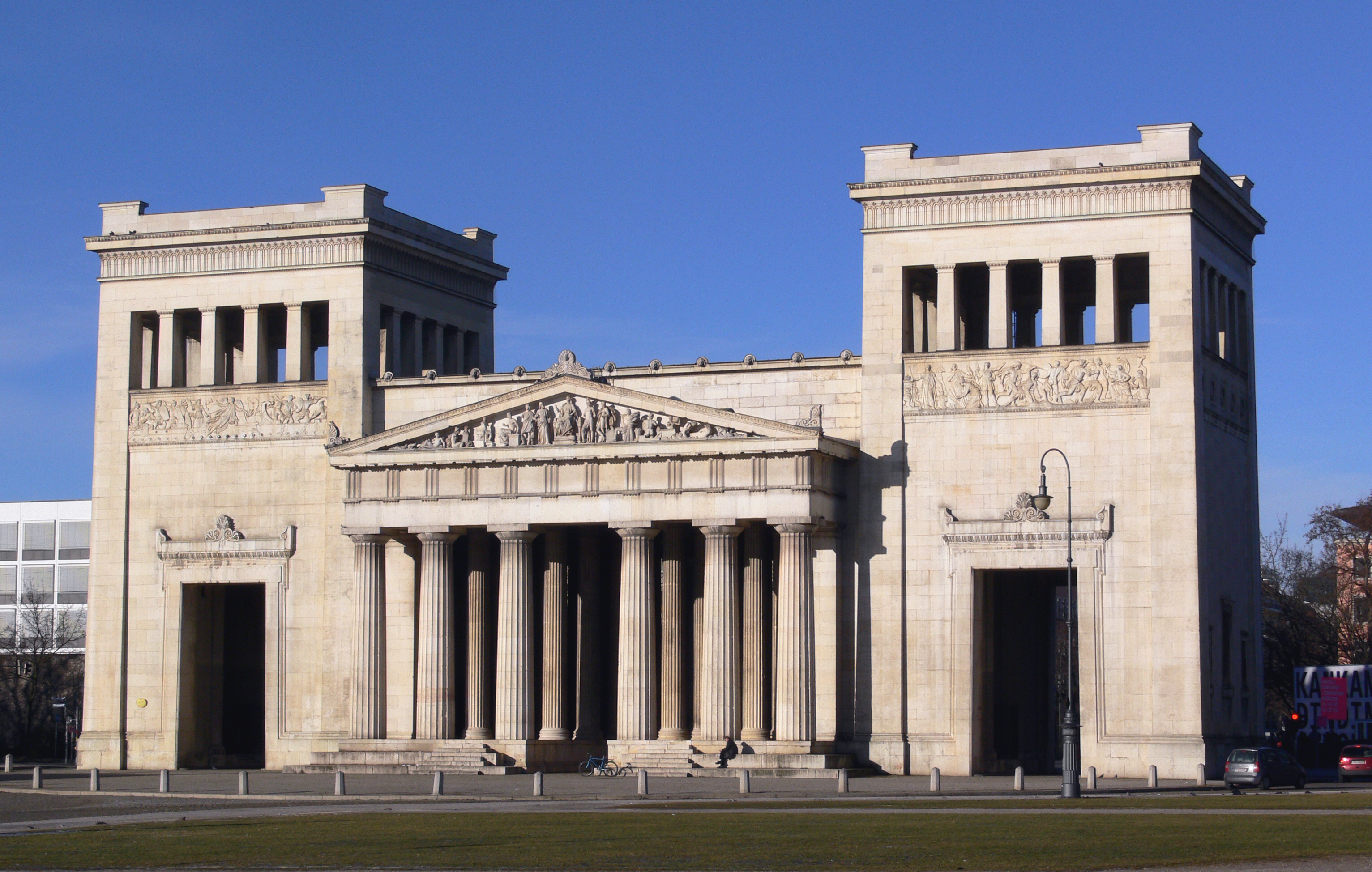 München, Propyläen